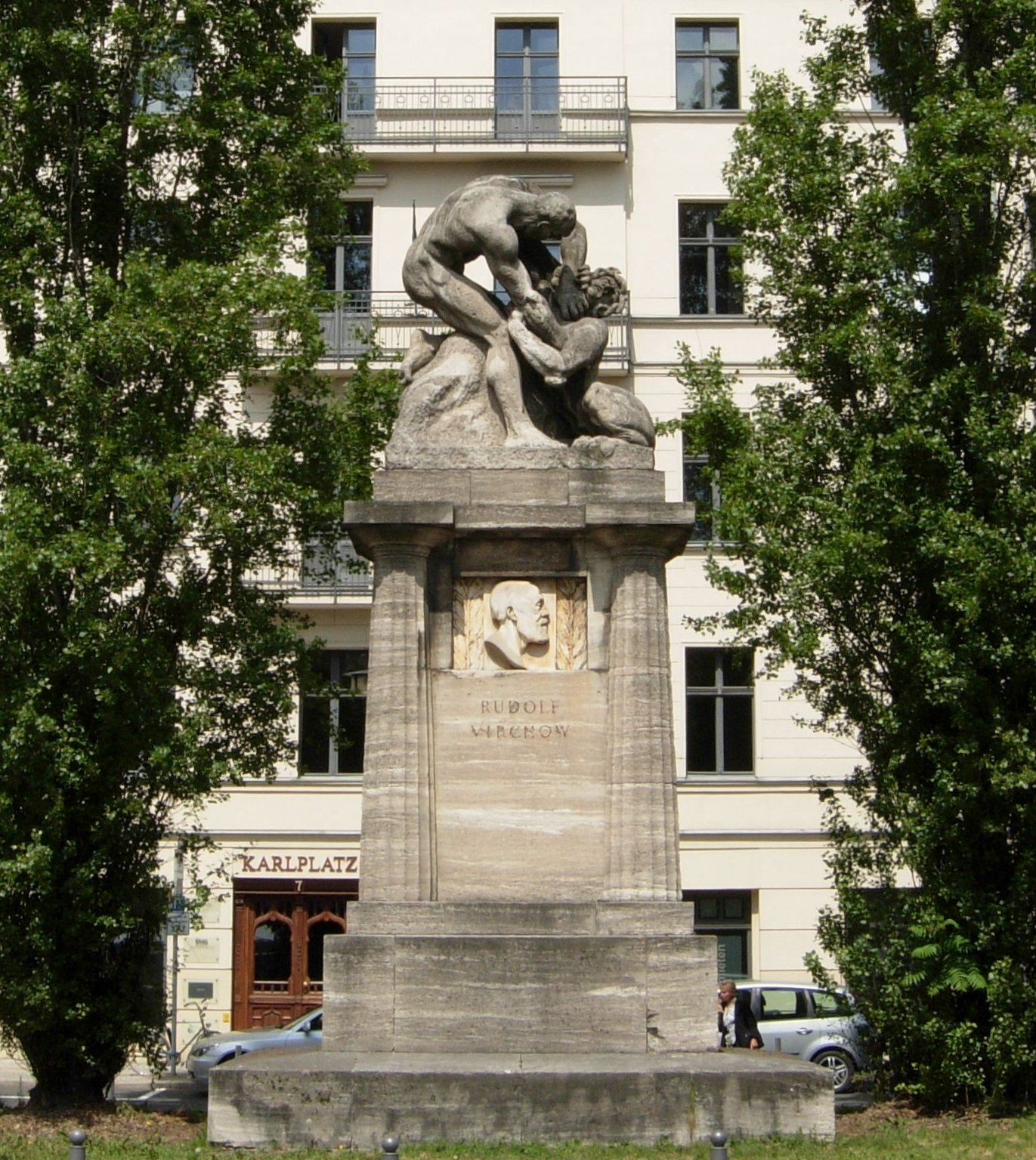 Berlin-Mitte (Friedrich-Wilhelm-Stadt): Denkmal (1906 – 1910) für Rudolf Virchow von Fritz Klimsch auf dem Karlplatz (Ecke Luisenstraße / Reinhardtstraße). Die Figurengruppe (Kampf gegen Krankheit, Titan erwürgt die Sphinx) besteht aus Kalkstein, das Portrait-Relief aus Marmor. Auf eine Vorgängerin der Pappeln, die im Bild zu sehen sind, bezieht sich Bertolt Brechts Gedicht „Die Pappel vom Karlsplatz“ (bei Brecht mit s geschrieben)